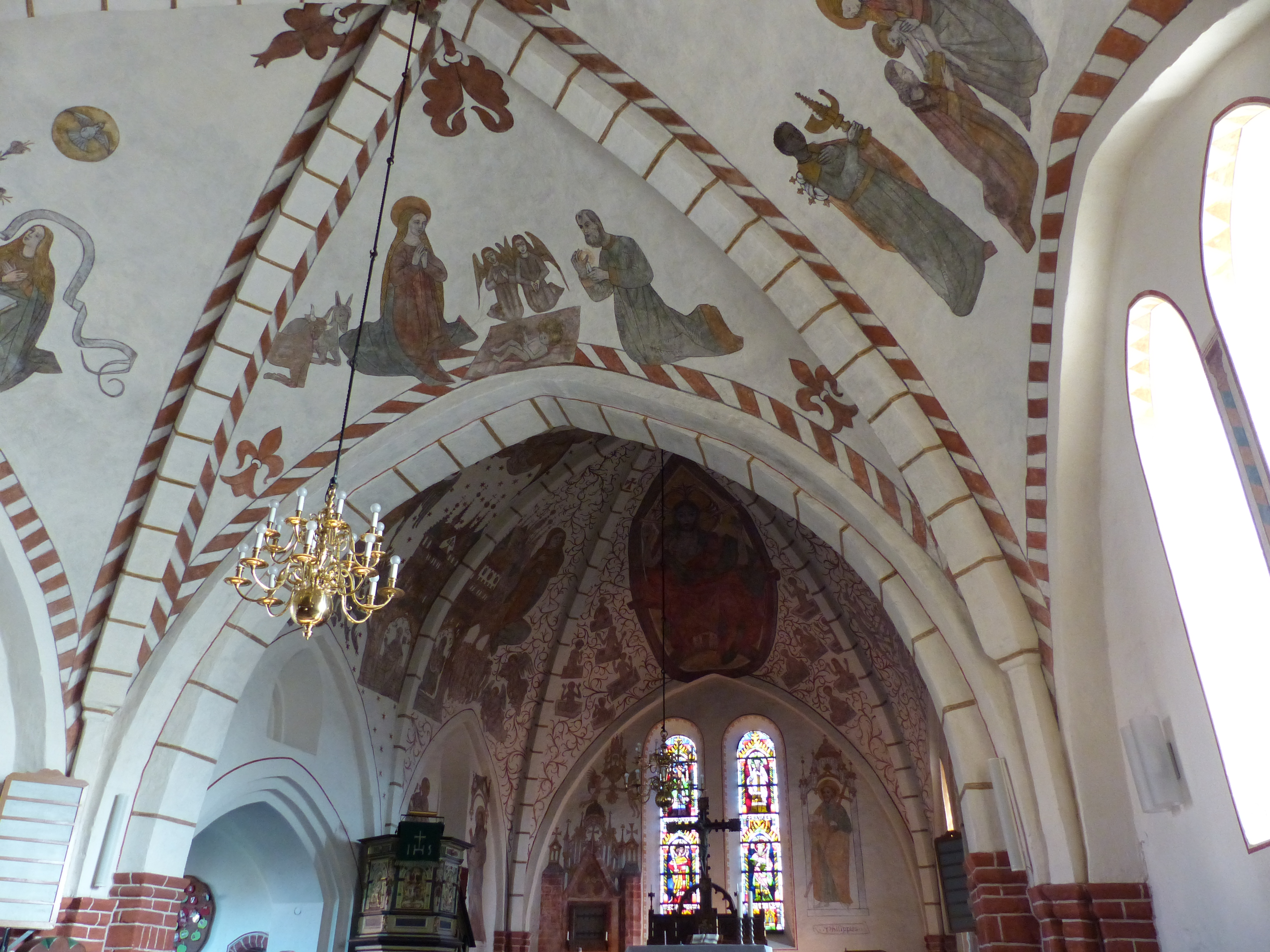 Spätgotische Fresken am Gewölbe des Langhauses der Andreaskirche in Riede